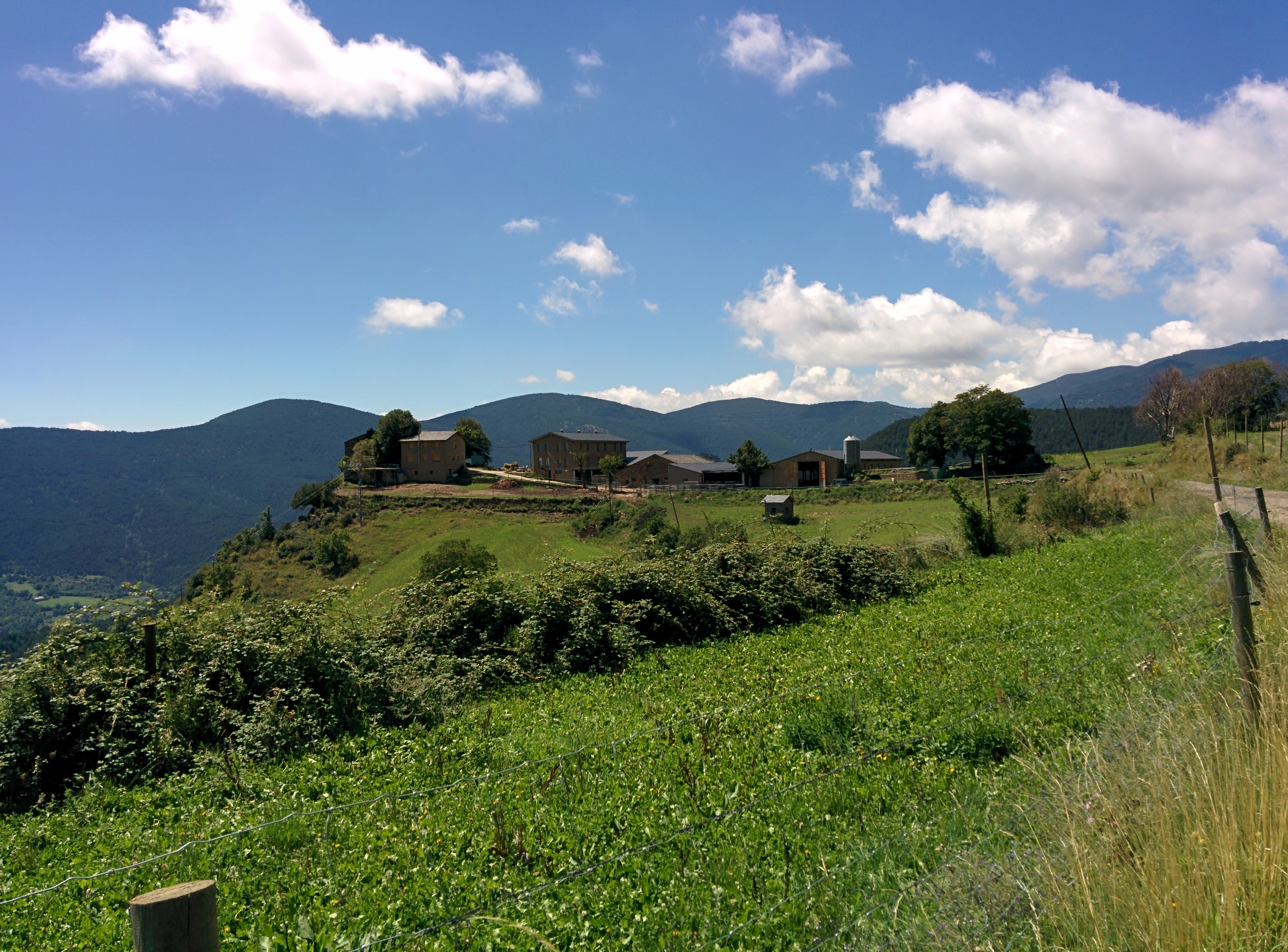 Al costat de la frontera d'Andorra amb la Vall de Valira